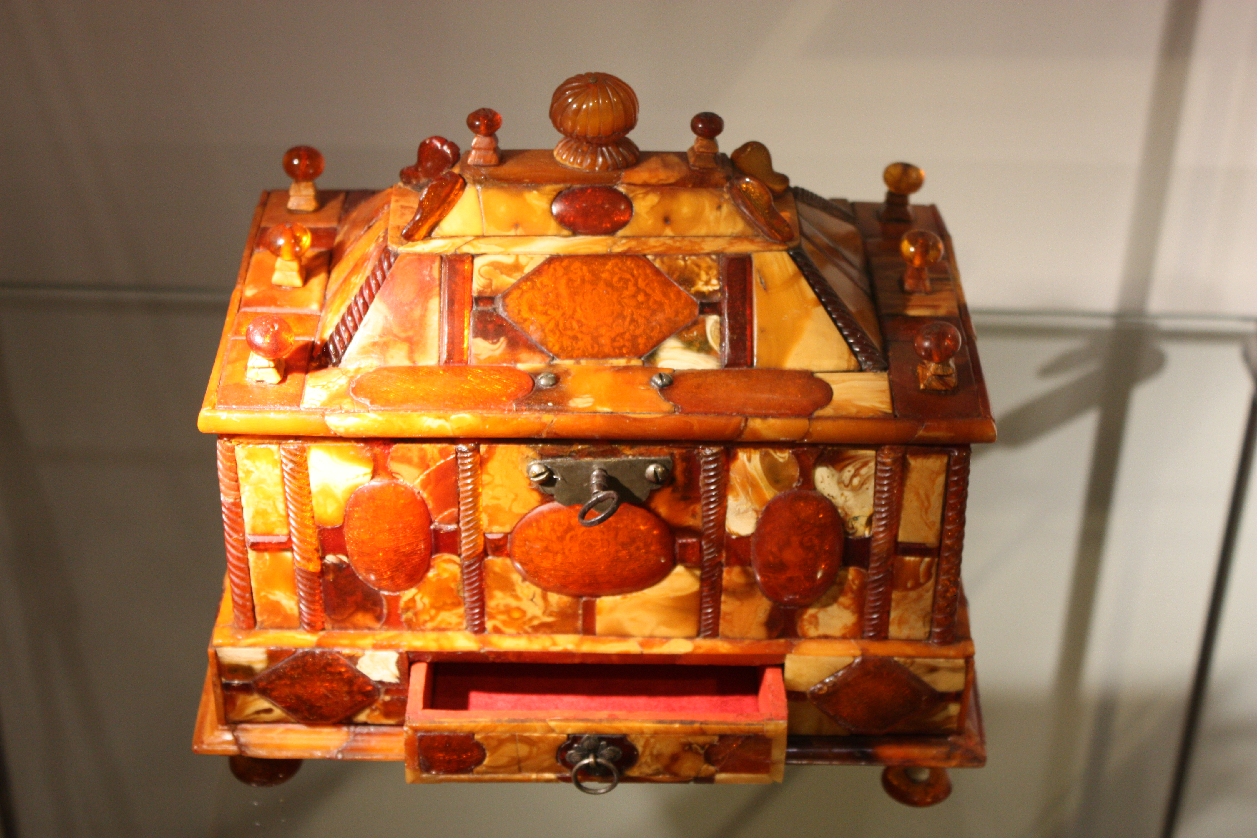 Gdańsk, ratusz Głównego Miasta, ob. Muzeum Historyczne, 1378-XV